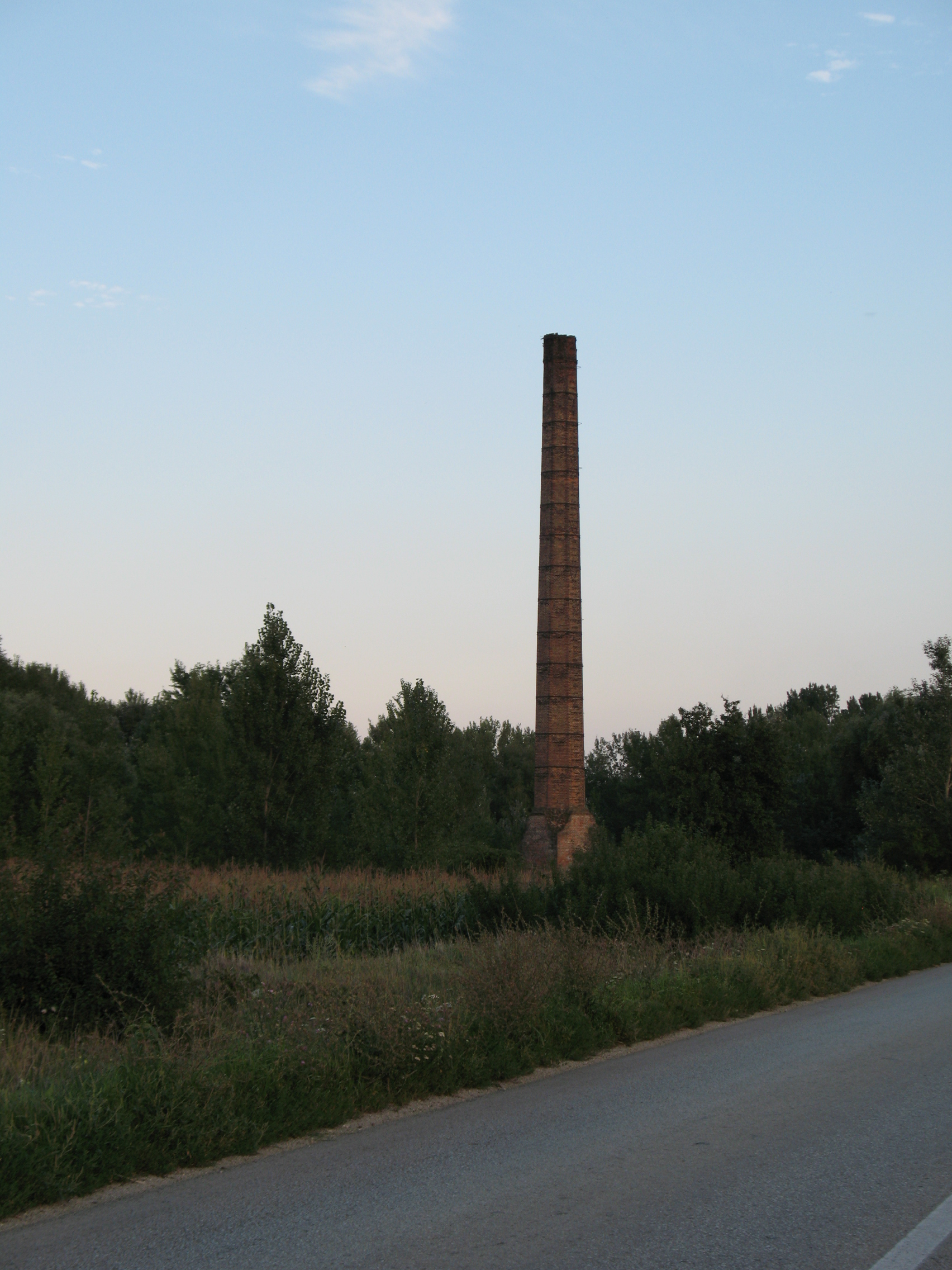 Zsigárd téglagyár megmaradt kéménye